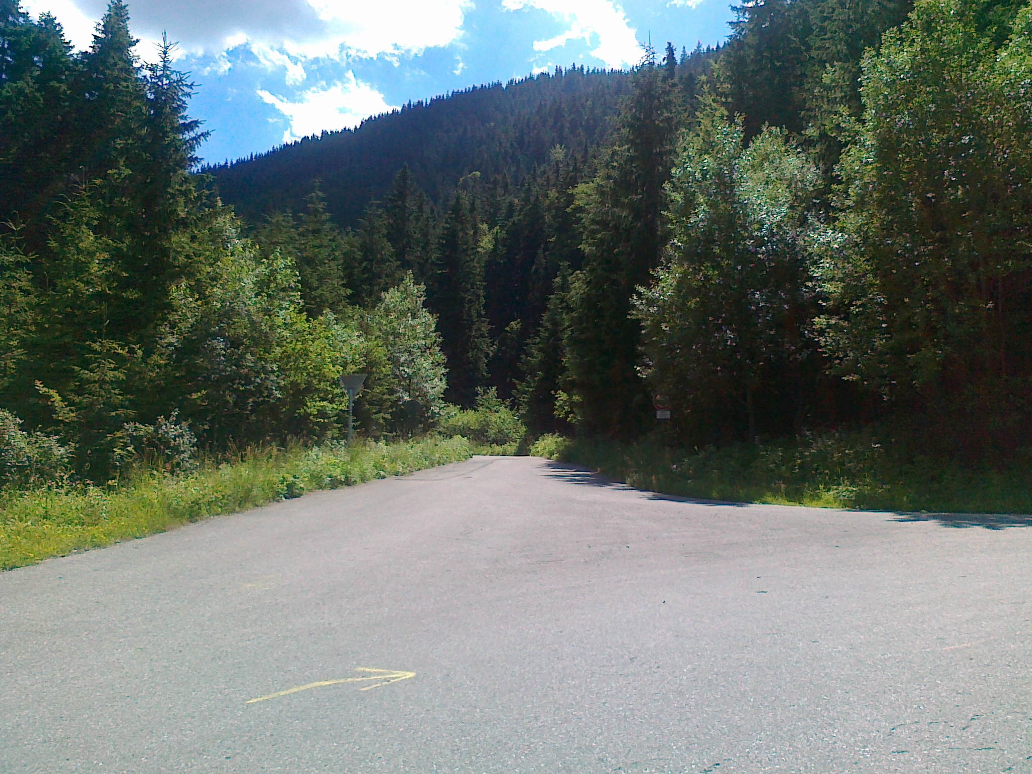 Widok ze skrzyżowania Pod Zámčiskem ma szczyt Velká Jezerna - JV